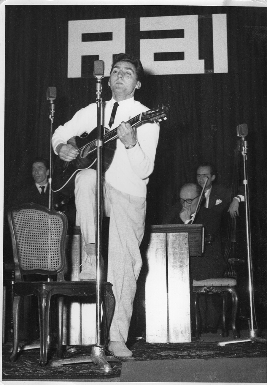 palcoscenico sisisi